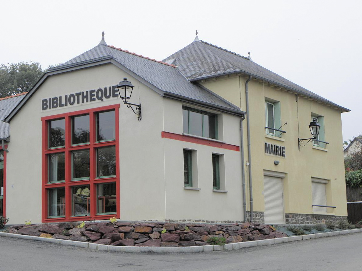 Mairie de La Nouaye (35).